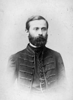 Gyulai Pál (1826–1909) író, költő, irodalomtörténész, kritikus, a Kisfaludy Társaság elnöke portréja. Schrecker Ignác fényképfelvétele